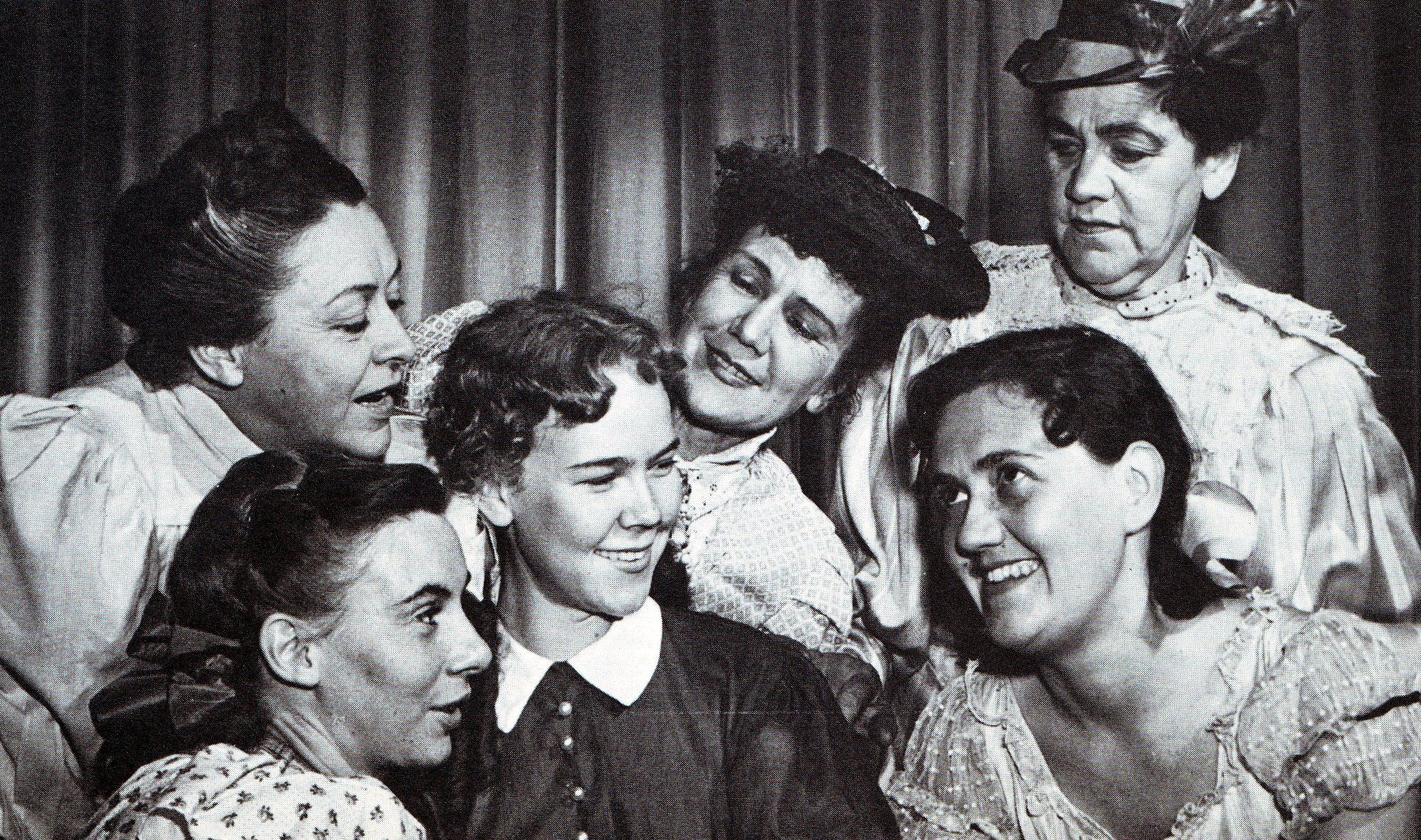 Toneel uit die toneelstuk: Ek onthou vir Mamma. Die drie moeders met hul drie dogters - almal saam in een N.T.O.-geselskap wat Ek onthou vir Mamma in 1954 opgevoer het. Die stuk het 'n jaar op die pad gebly. Links agter: Wena Naudé en voor haar Nilo, haar dogter. Middel: Elsa en Bobbette Fouché. Regs: Mathilda en Tilana Hanekom.